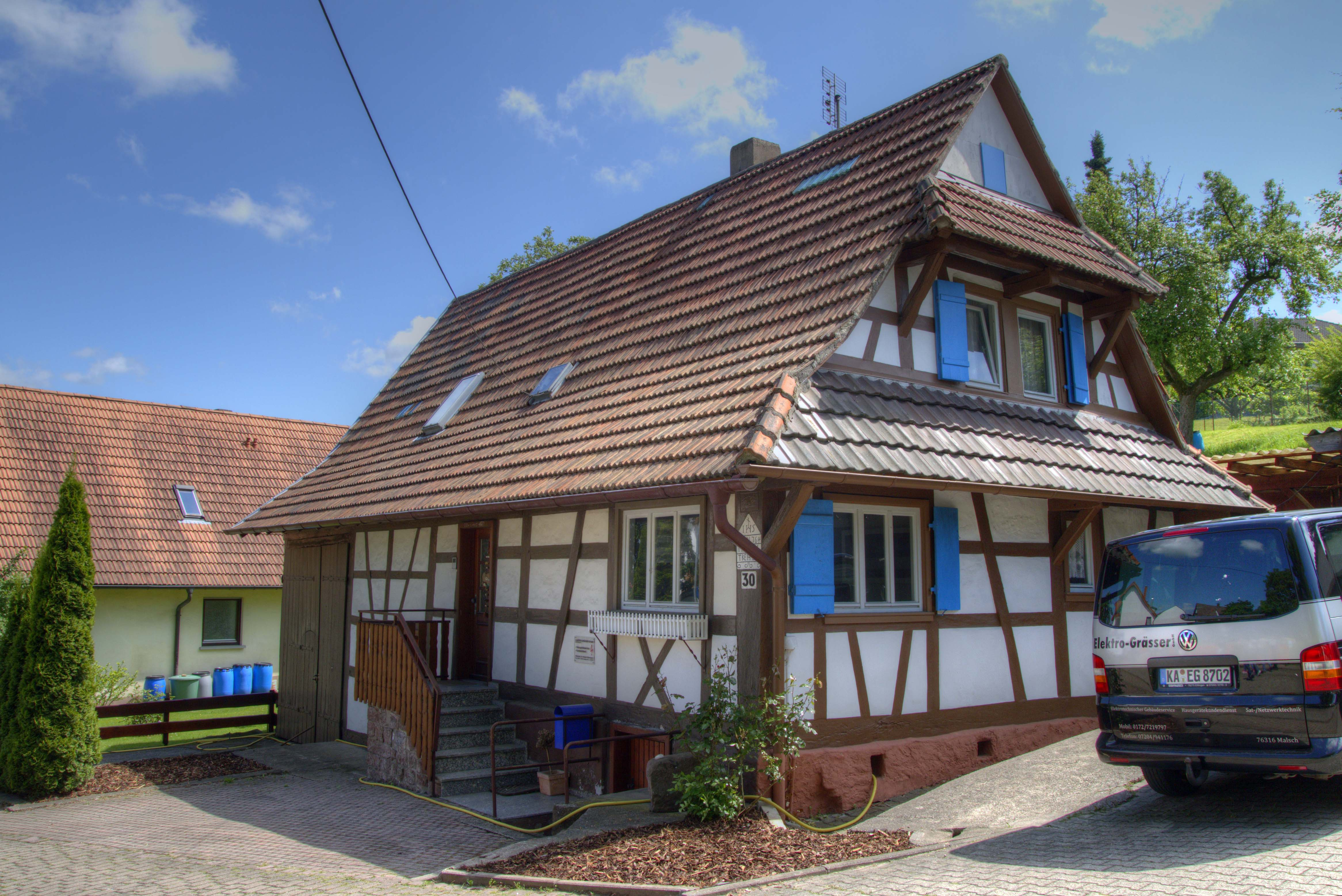 Ein Fachwerkhaus, aus dem Malscher Teilort Völkersbach.